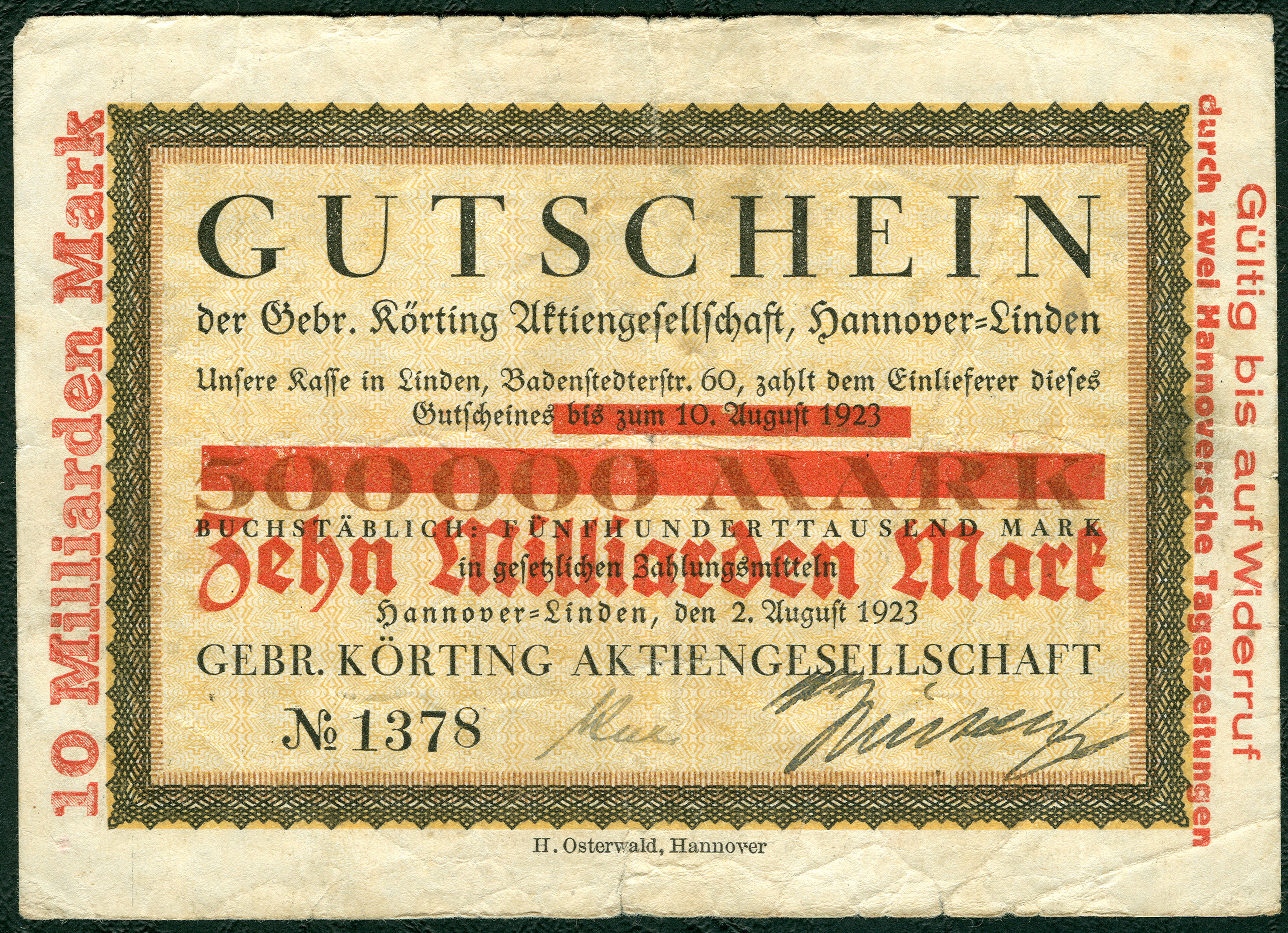 "Gutschein der Gebr. Körting Aktiengesellschaft, Hannover-Linden. Unsere Kasse in Linden, Badenstedterstr. 60, zahlt dem Einlieferer dieses Gutscheines (bis zum 10. August 1923 500 000 Mark buchstäblich: Fünfhunderttausend Mark) Zehn Milliarden Mark in gesetzlichen Zahlungsmitteln. Hannover-Linden, den 2. August 1923, (Unterschriften) Gültig bis auf Widerruf durch zwei Hannoversche Tageszeitungen". Dieser überdruckte Notgeld-Schein mit Wasserzeichen und der "No. 1378" aus den Zeiten der Deutschen Hyperinflation nach dem Ersten Weltkrieg wurde von der Druckerei Heinrich Osterwald hergestellt. Die Rückseite ist blanco, das Papier circa 12,6 cm x 8,9 cm.